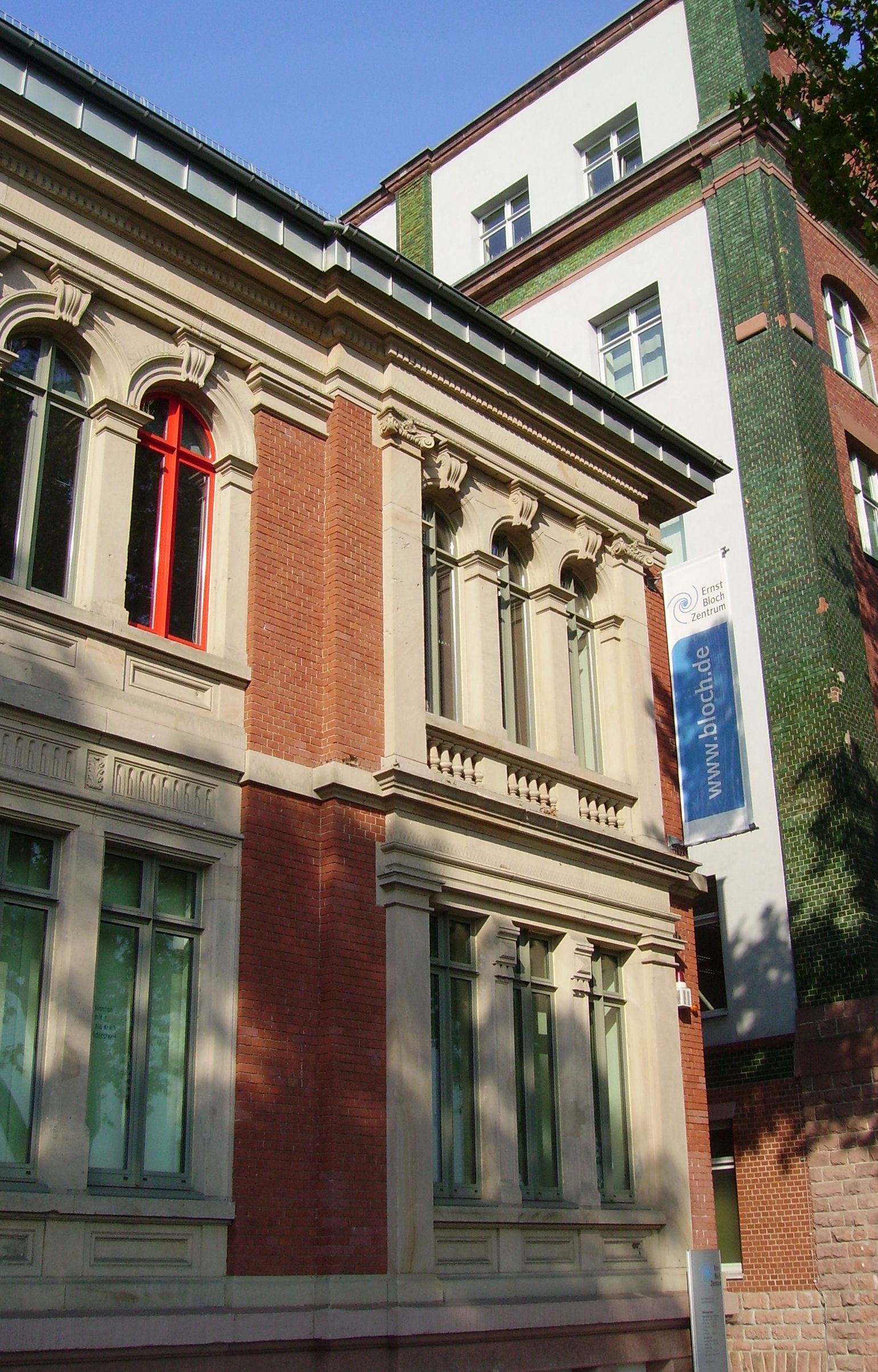 Ernst-Bloch-Zentrum of Ludwigshafen in Rhineland-Palatinate (Germany)